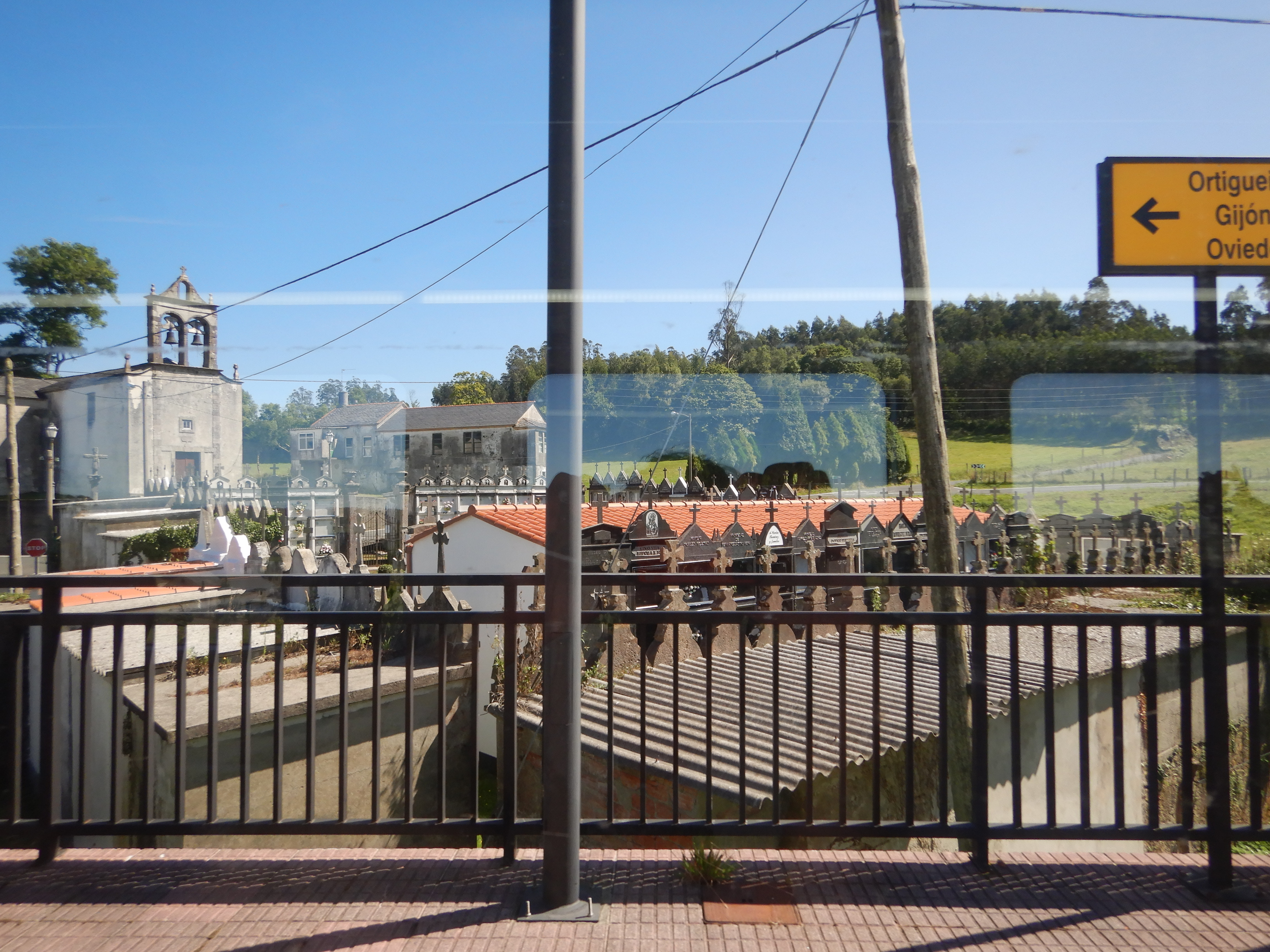 Widok z pociągu FEVE podczas postoju w Labacengos.